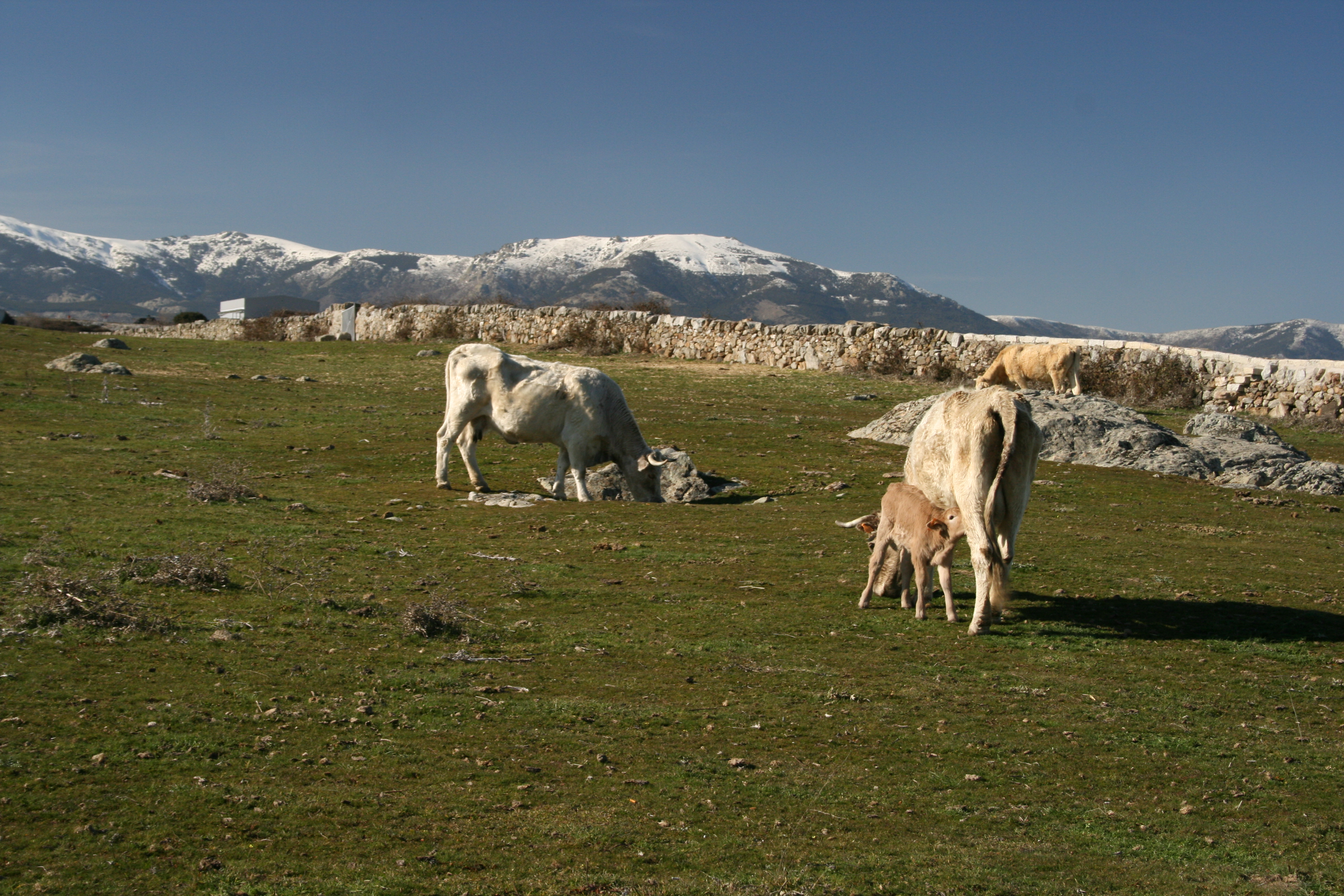 Dehesa de Navalvillar en Colmenar Viejo, Madrid (España). Uso como lugar de pasto comunitario para el ganado vacuno. Al fondo la Sierra de Gudarrama.